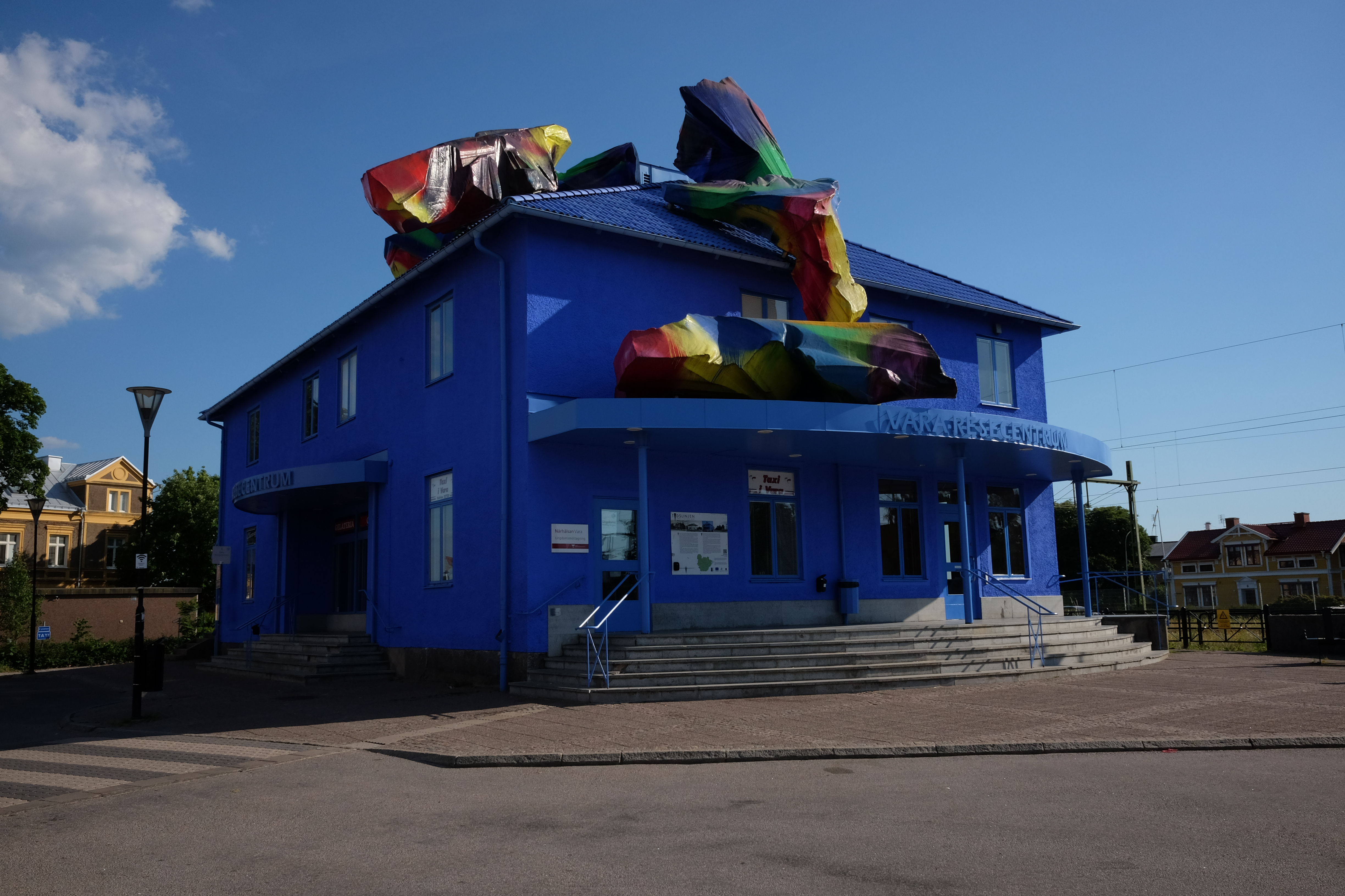 Vara resecentrum.